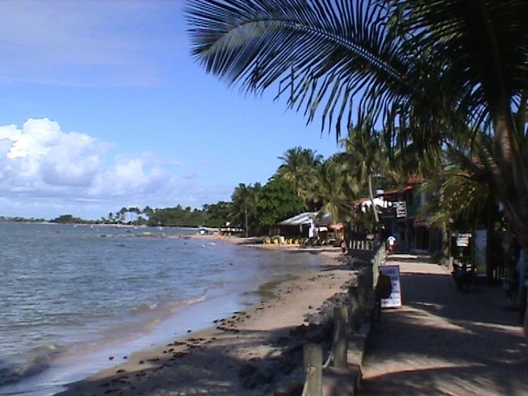 Morro de São Paulo.